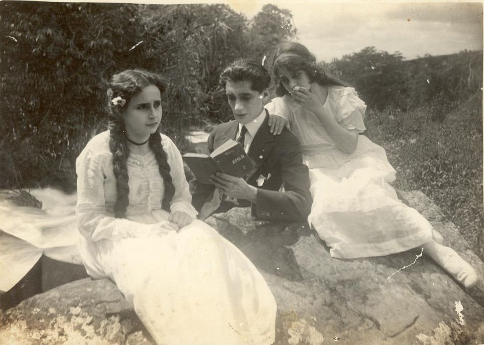 Hernando Sinisterra, Efraín y la actriz que representa a María, en la pelicula "María". Novela escrita por Jorge Isaccs, una de las más importantes del genero romático. Hacienda el Paraiso - El Cerrito, fecha de filmación, 1920.